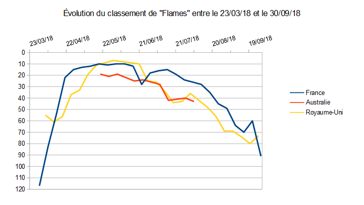 Évolution du classement du single Flames de David Guetta et Sia entre le 23/03/18 et le 30/09/18.